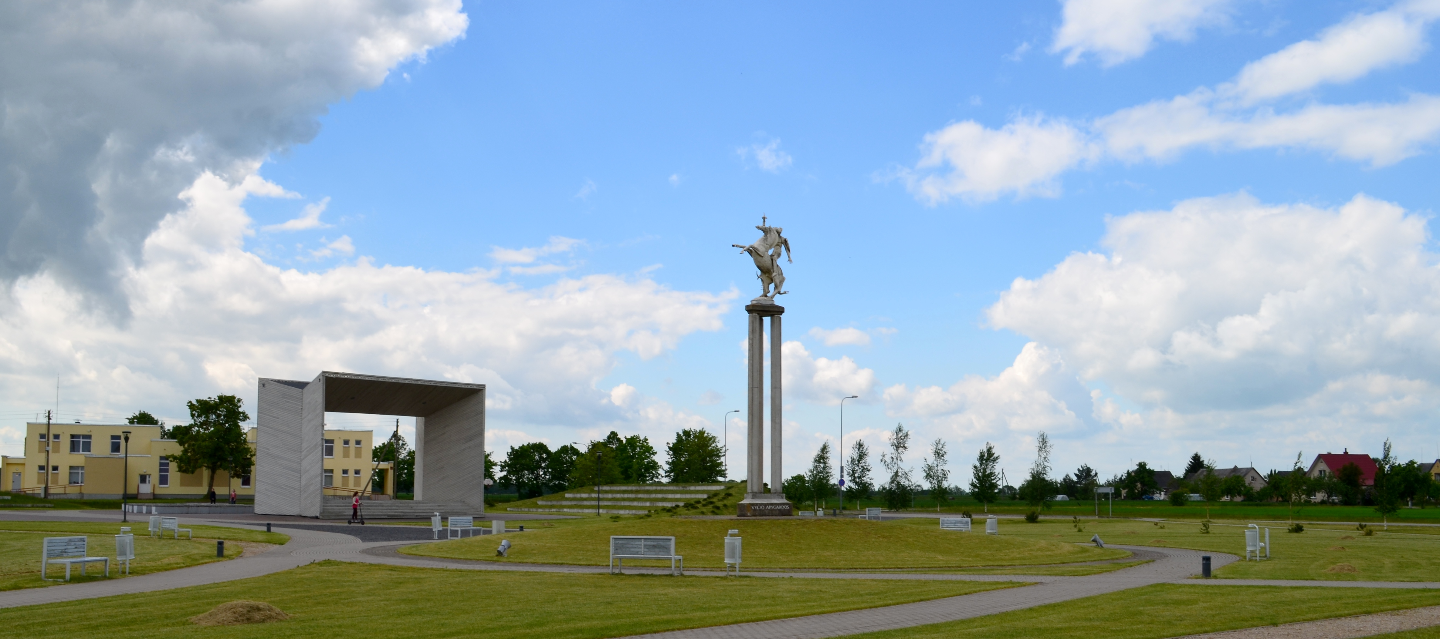 Paminklas Vyčio apygardos partizanams, Vadokliai, Panevėžio raj.